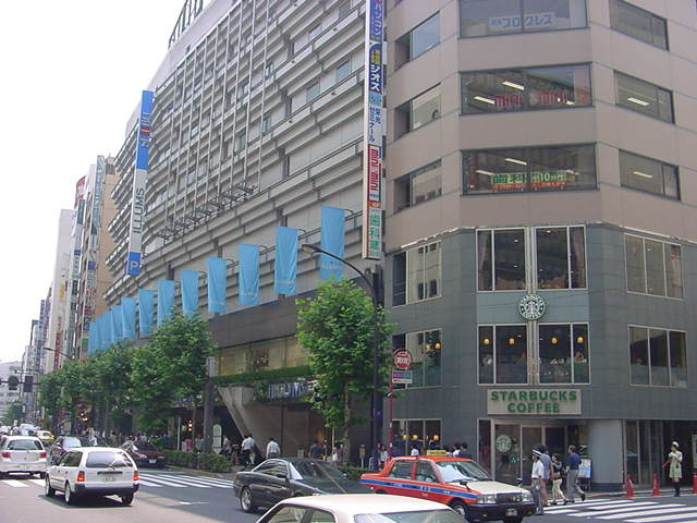 SEIBU DEPARTMENT STORES ILLUMS BUILDING